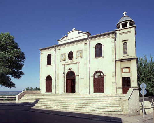 Biserica grecească pontică din Constanța, cu hramul Schimbării la față.